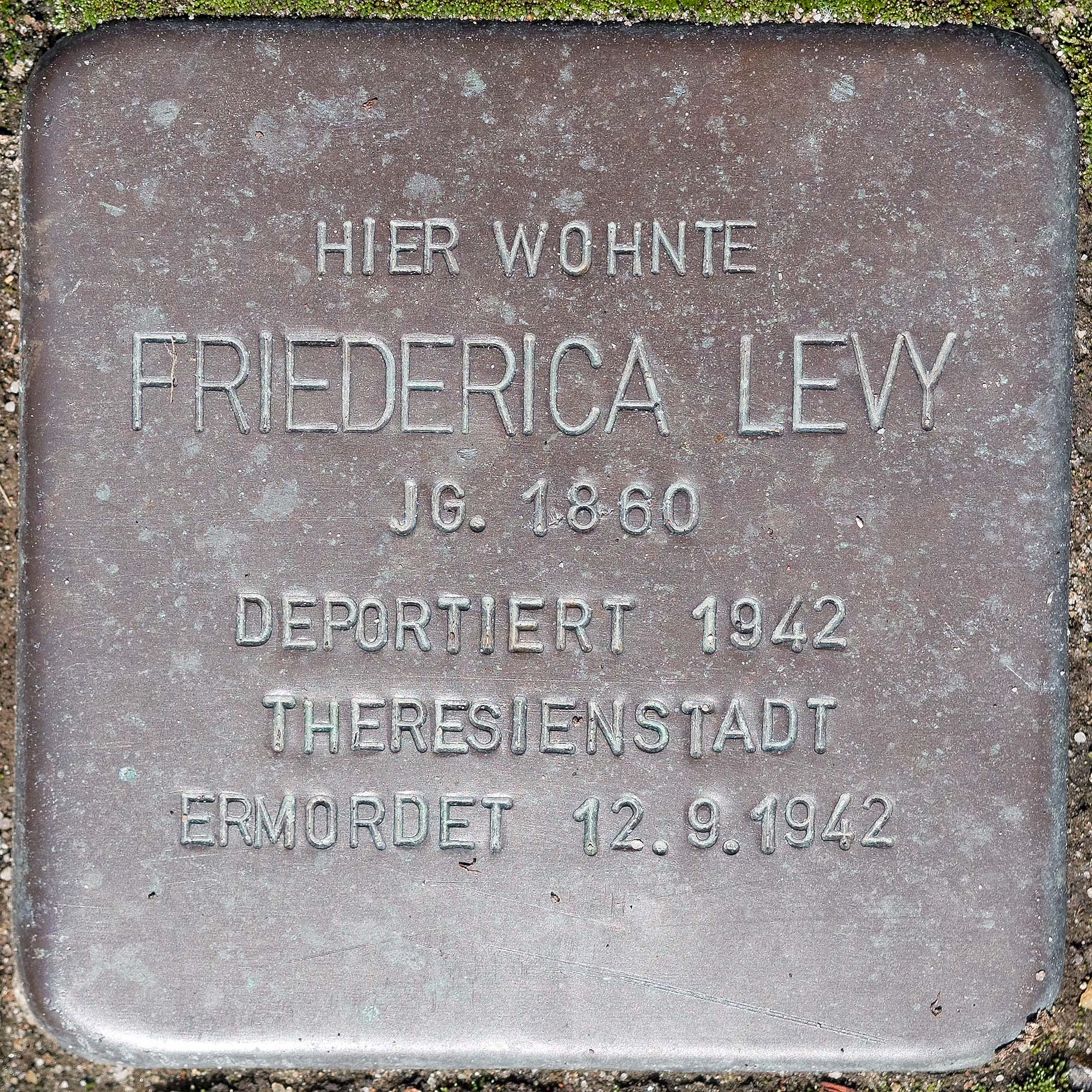 Stolperstein Nettetal: Friederica Levy